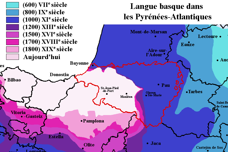 Carte montrant la langue basque dans les Pyrénées-Atlantiques au cours de l'histoire